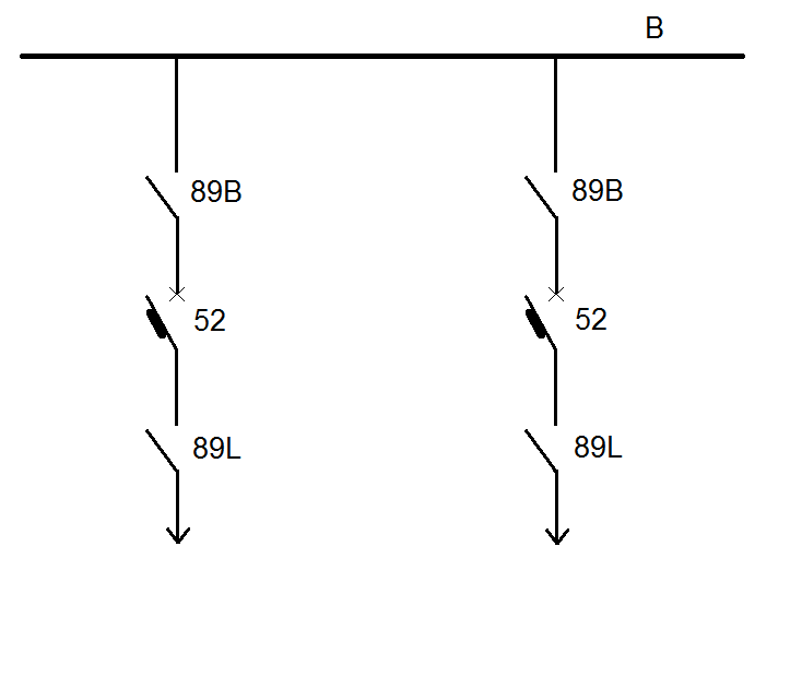 Esempio di_montante a singola sbarra